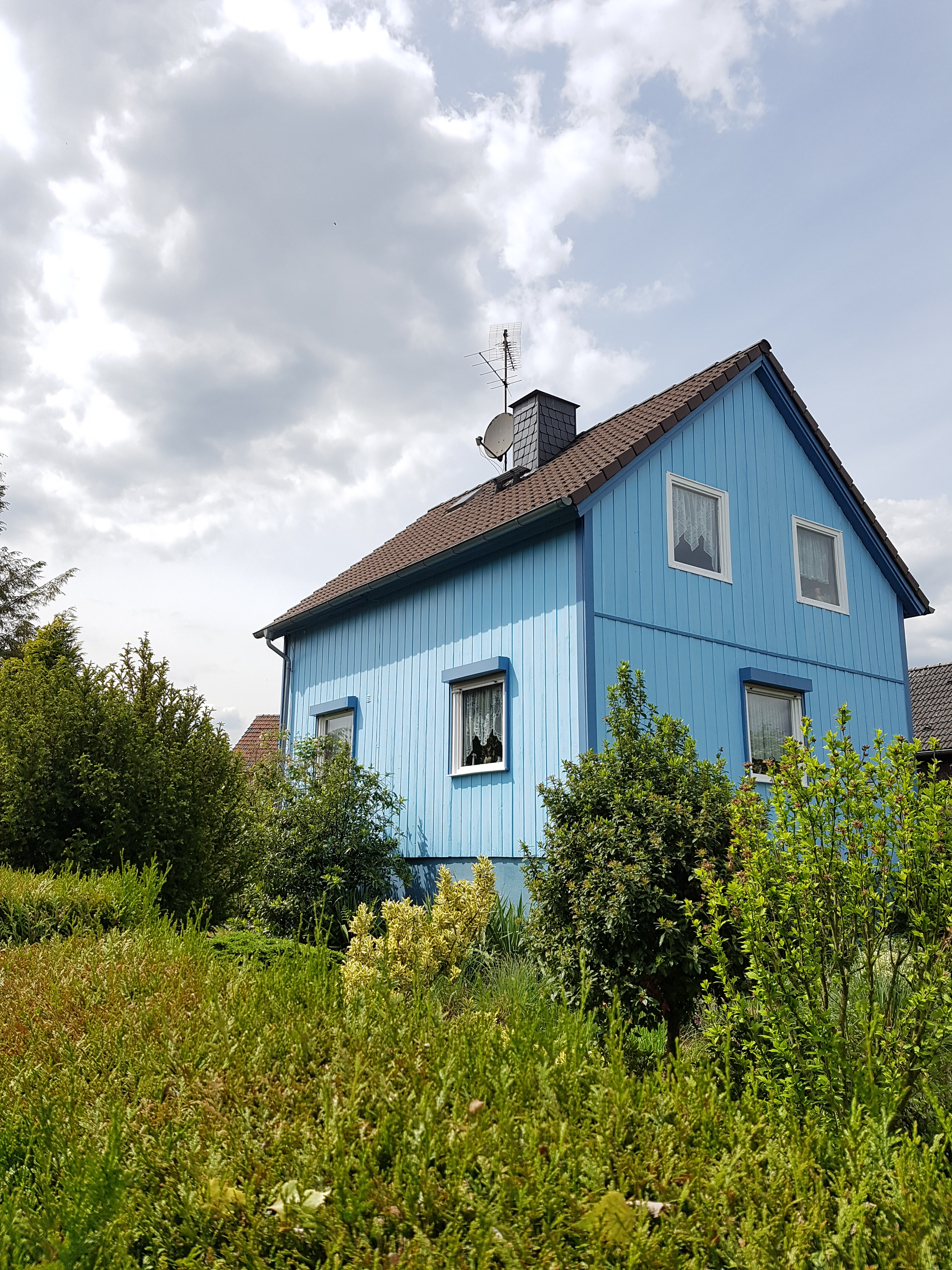 Holzhaus aus Norwegen - der Stadt Essen nach dem 2. Weltkrieg gespendet.